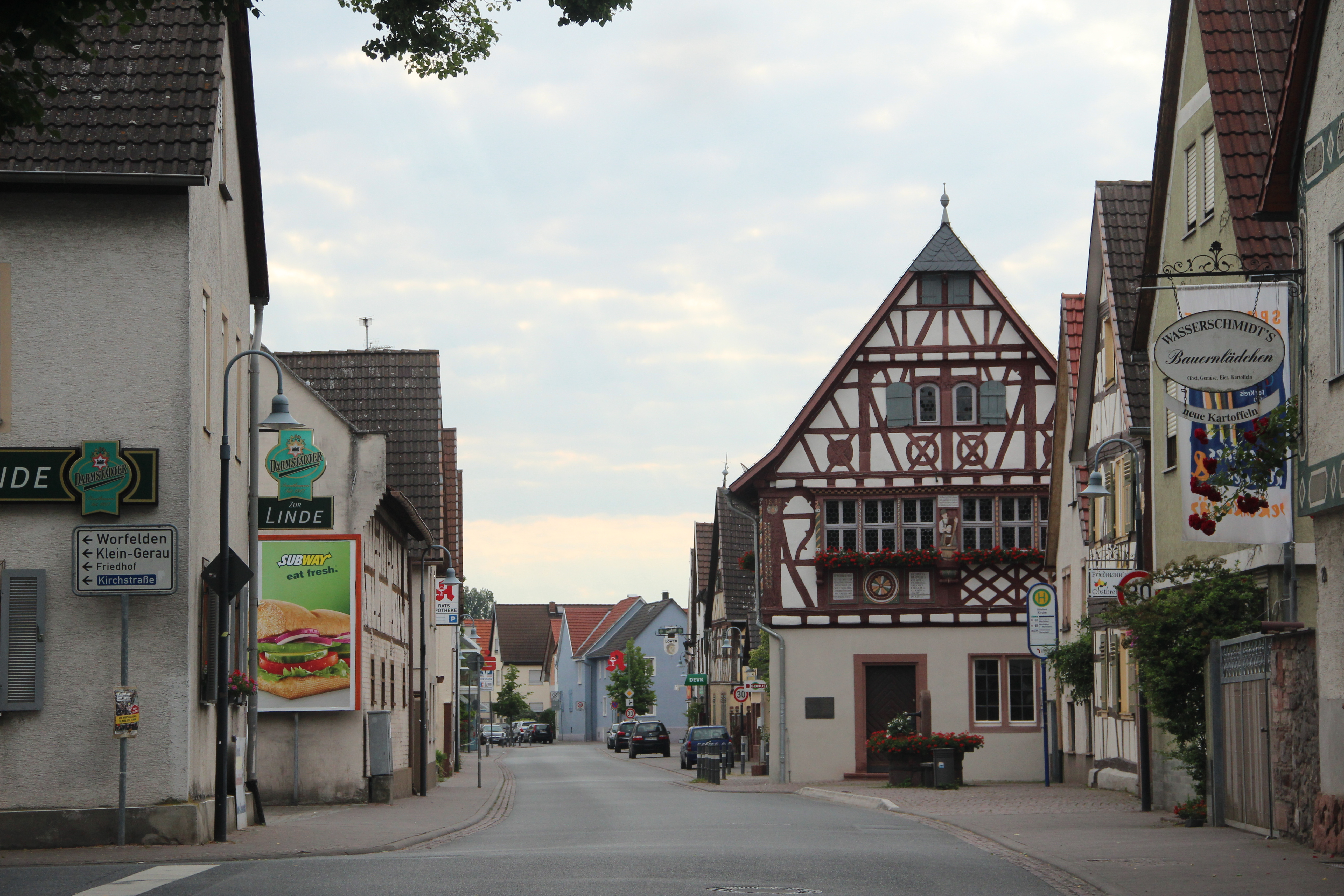 Büttelborn Mainzer Str. - Kirchstr.